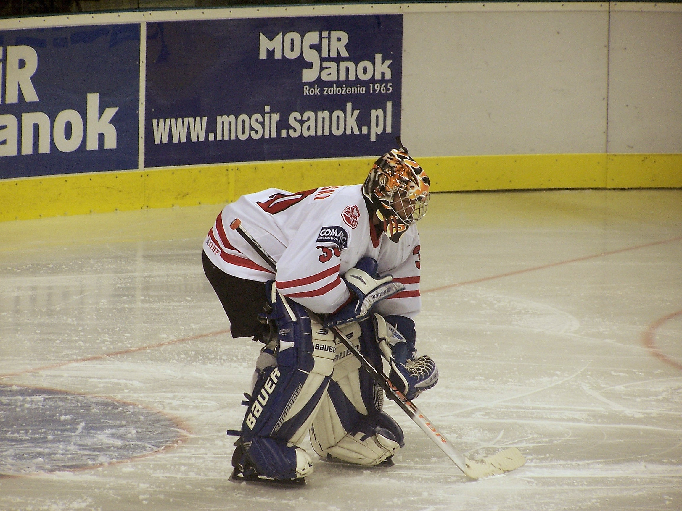 Tomasz Jaworski w bramce podczas meczu reprezentacji Polski z Węgrami, Arena Sanok 12.04.2006